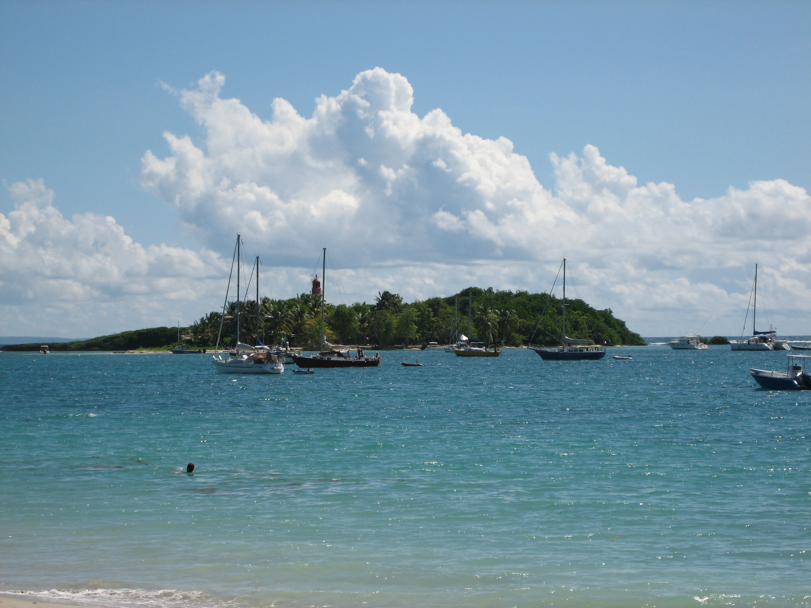 L'ilet du Gosier